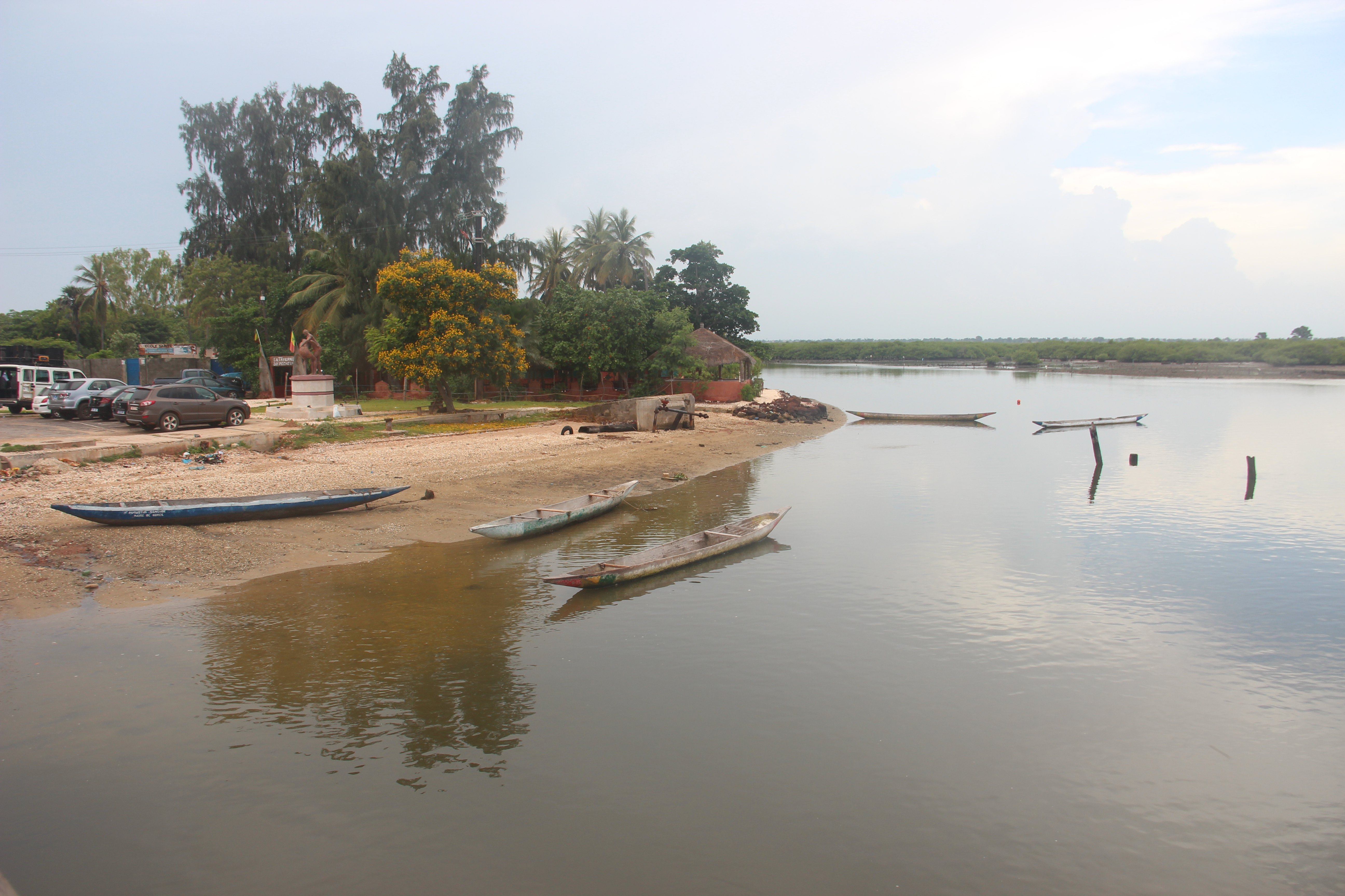 Pirogues à Joal-Fadiouth. This is an image with the theme "Africa on the Move or Transport" from: Senegal